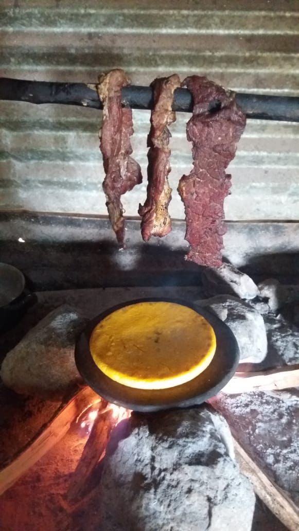 tortilla azada